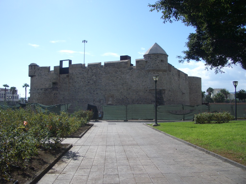 Castillo de La Luz en obras